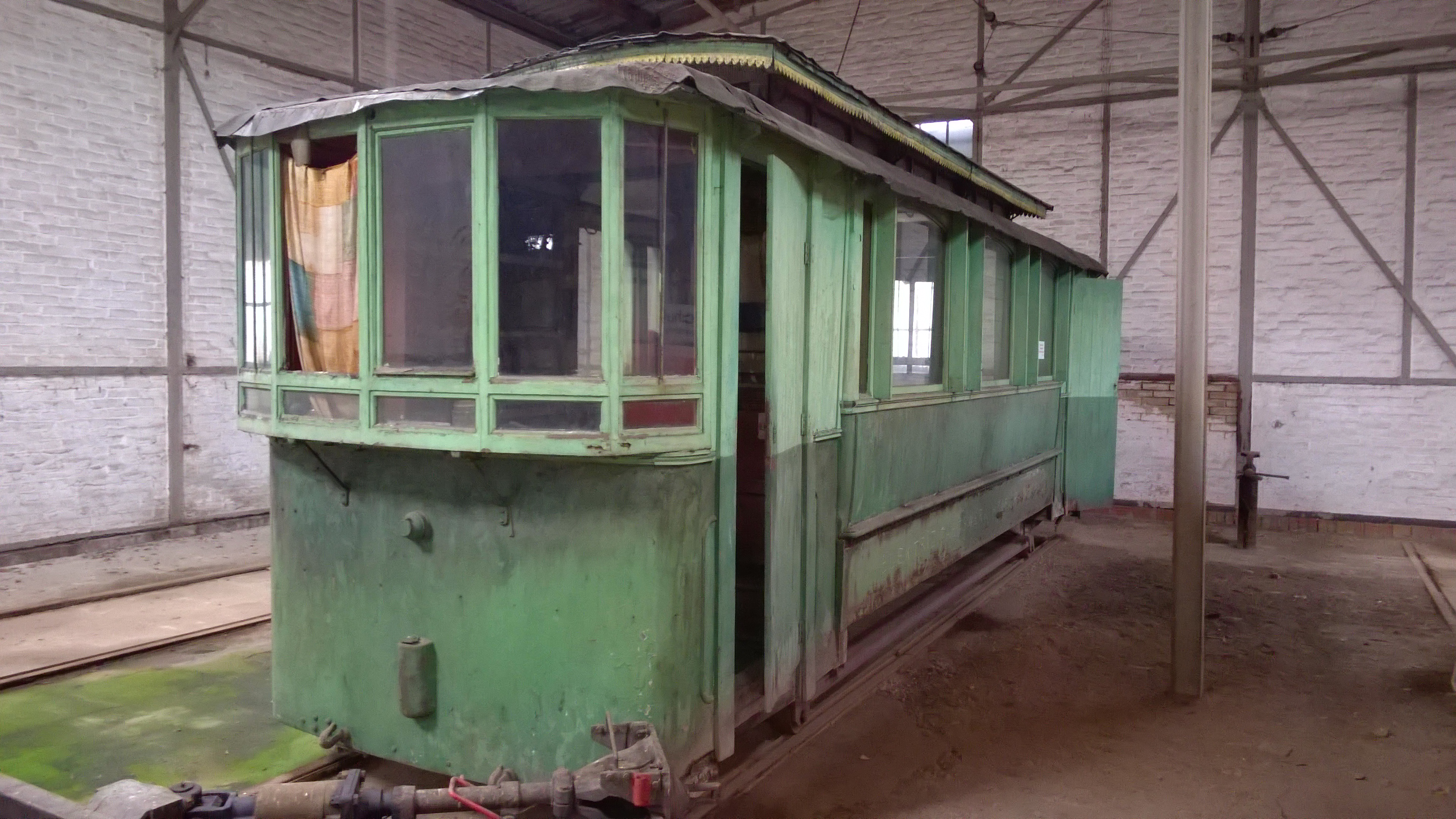 Aufbau des Wagen 2 der ehemaligen Homburger Straßenbahn